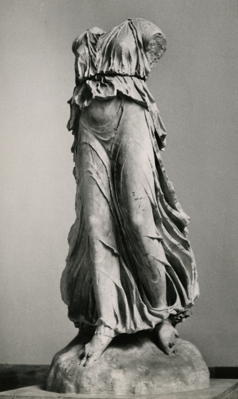 Napoli. Museo Archeologico Nazionale. Nike acefala e priva di ali, sec. V. a.C., marmo. Servizio fotografico : Napoli, 1969 / Paolo Monti. - Stampe: 2 : Positivo b/n, gelatina bromuro d'argento/ carta, 24x30. - ((Sul coperchio della scatola iscrizione didascalica manoscritta a pennarello nero: "Scultura Moderna". - Occasione: Documentazione del nuovo allestimento del Museo Archeologico Nazionale. - Fonte: Agenda di Paolo Monti: Monti - Agenda 1969 (1969), presso Archivio Paolo Monti